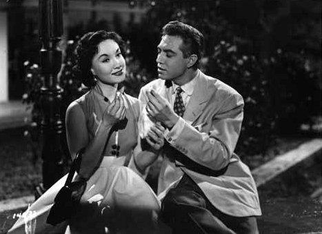 Fotografía blanco y negro sobre papel fotográfico brillante con marco perimetral blanco. Escena en exteriores. A la izquierda, Lolita Torres de tres cuartos perfil derecho, sonriente; a la derecha, Alberto Dalbés, de tres cuartos perfil izquierdo, mirándola.